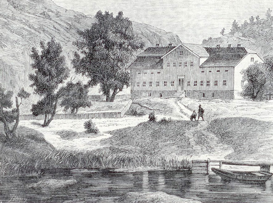 Xylografi av Eskeviken gård fra Skillingmagasinet fra 1869.